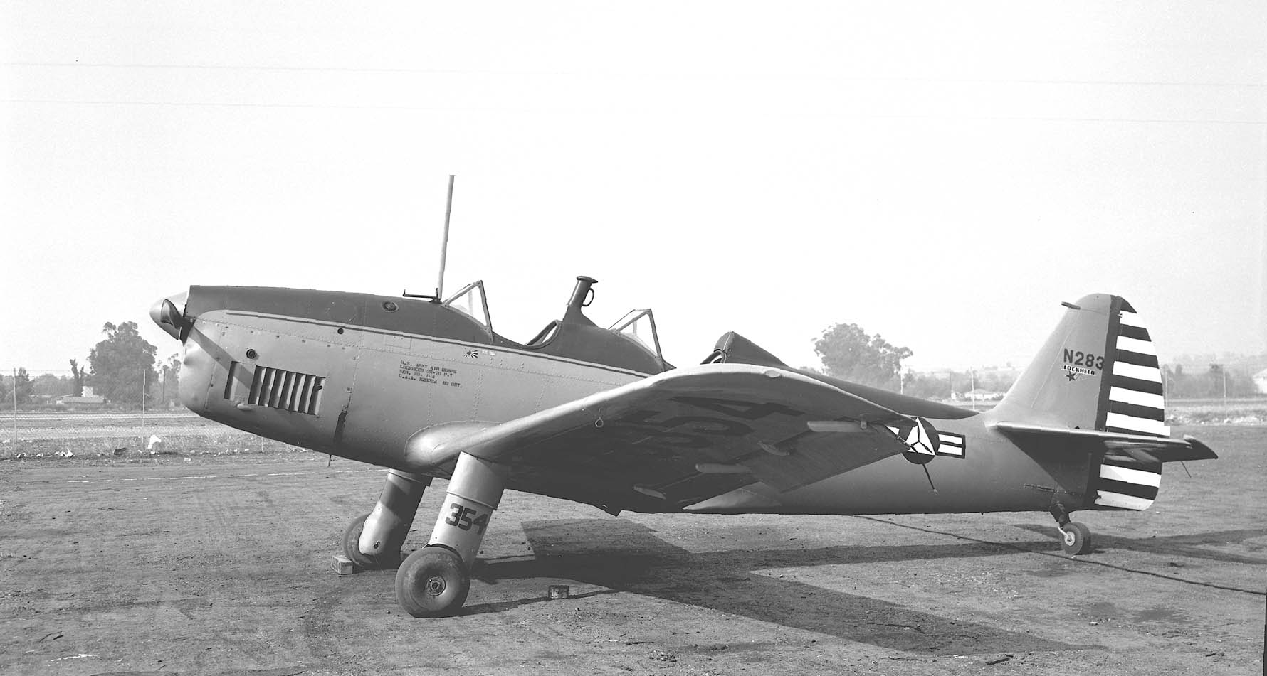 Vega 35 (N28354) at Los Angeles in 1954.